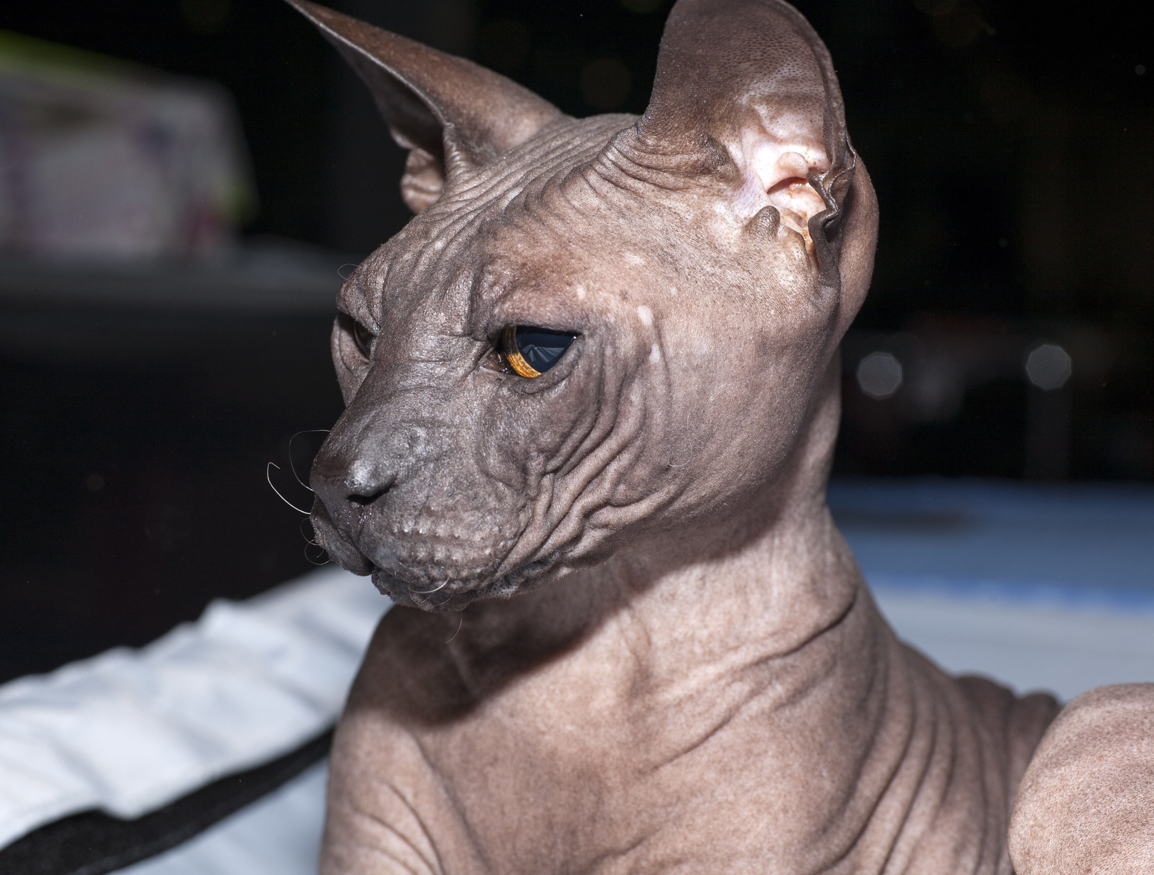 Лонской сфинкс DSX World Premior RU*Don Xuk's Login WOW, №1099 по каталогу выставки «Содружество-2014» (WCF). Кот-кастрат. Окрас: чёрный (DSX n). Дата рождения: 19/07/2008. Владелец: И.Капустина. Клуб не указан, Киров